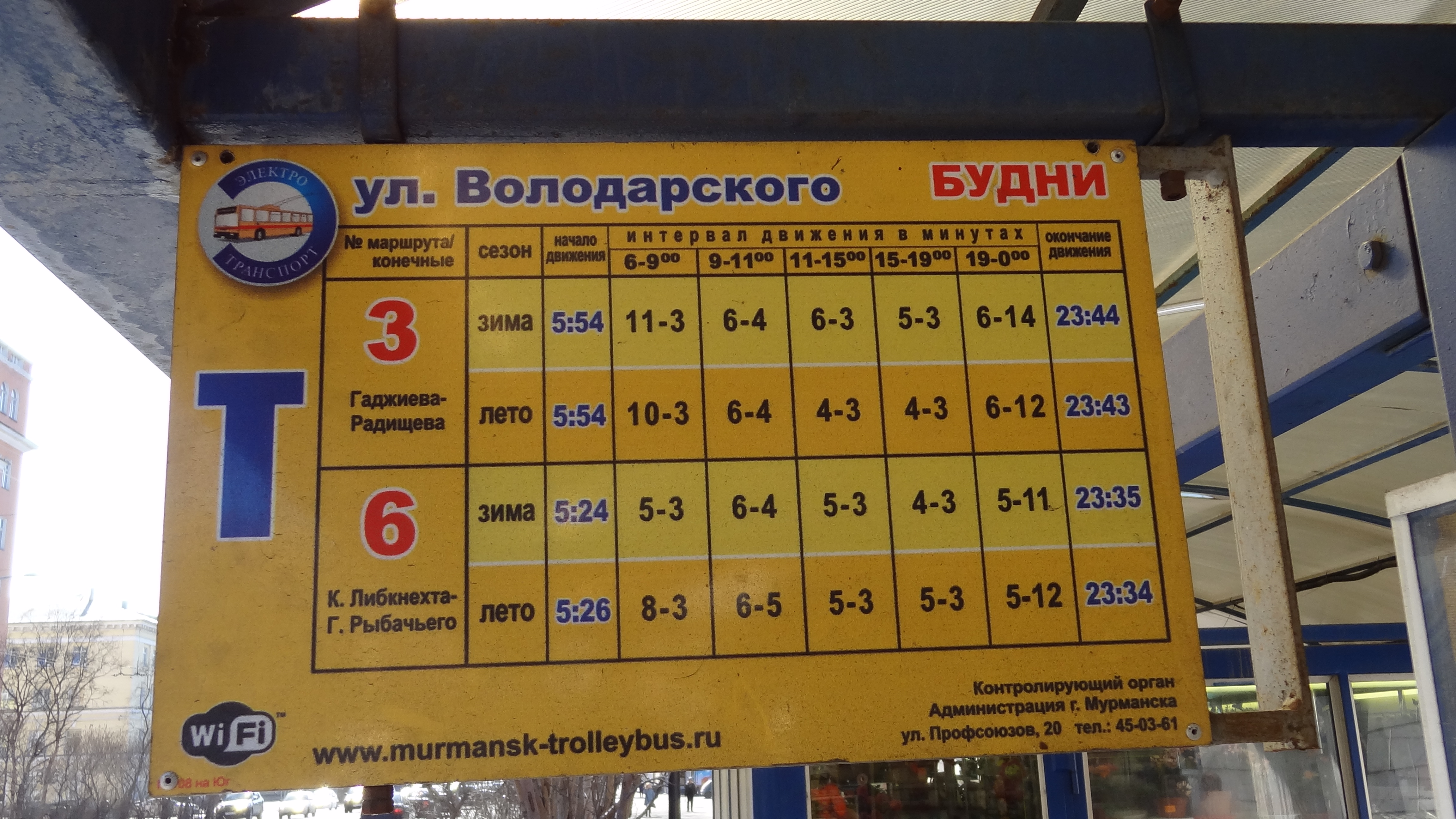 Таблички на троллейбусных остановках Мурманска. С 2011 года